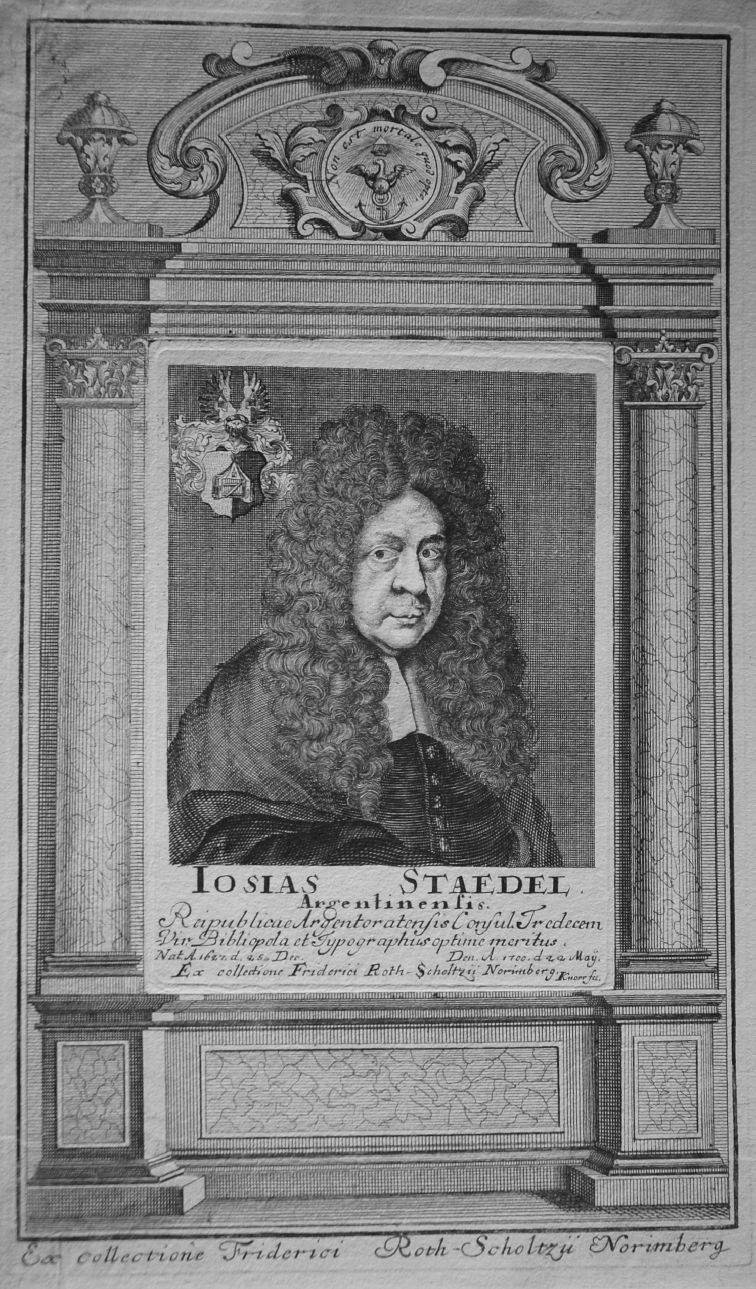 Josias Staedel - libraire à Strasbourg